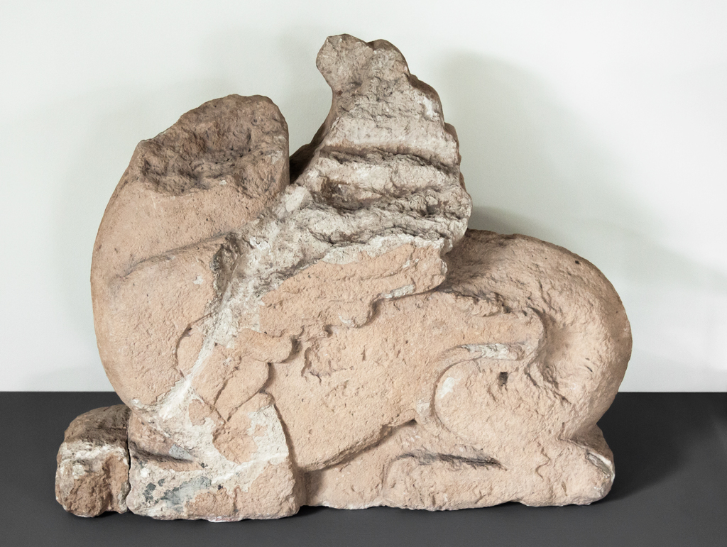 Esfinge alada ibérica de piedra caliza del yacimiento arqueológico de Alarcos (Ciudad Real), 600 a.C-100 a.C aprox.